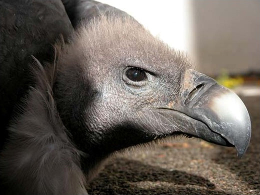 Bengalgeier (Gyps bengalensis)